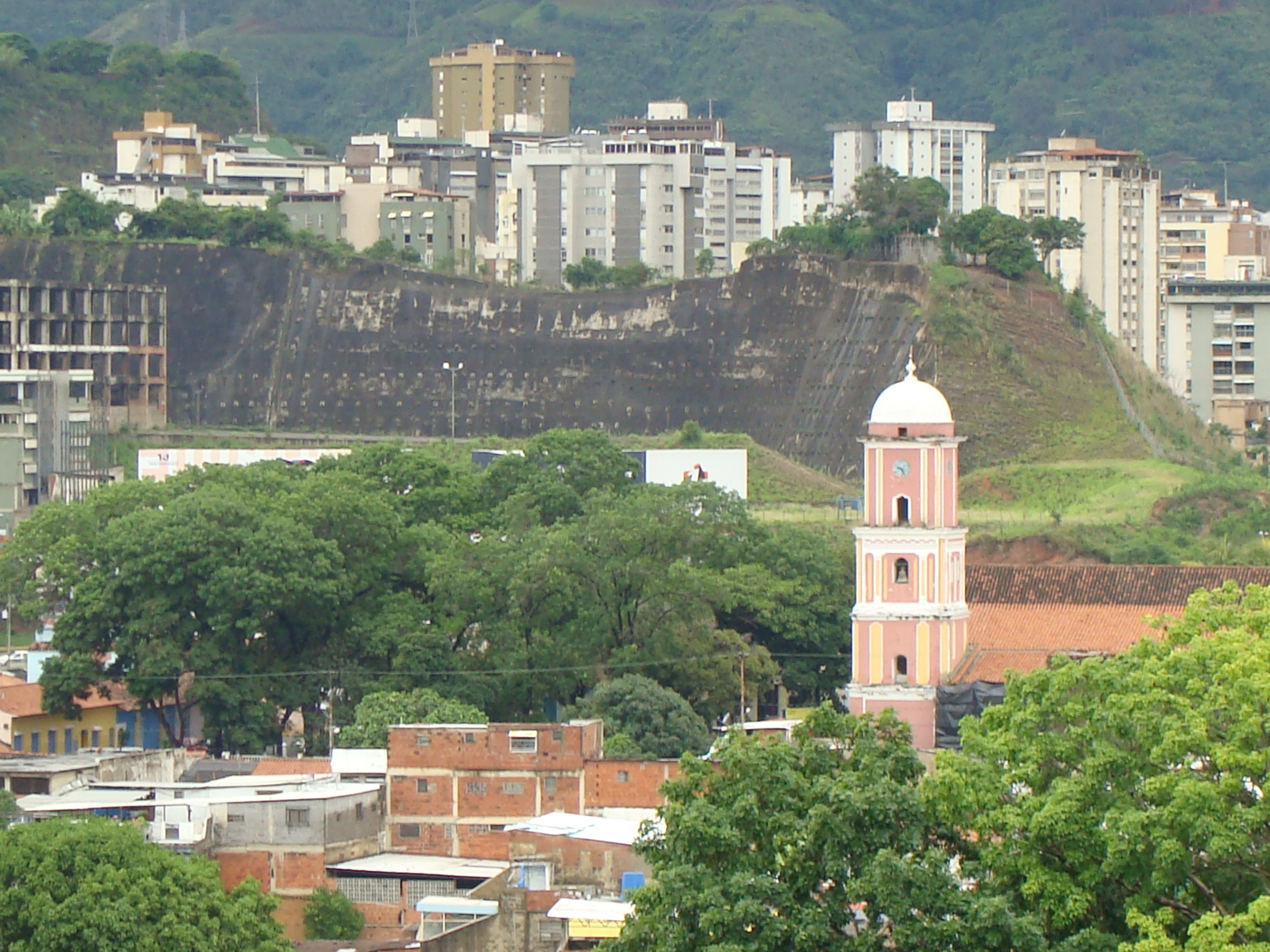 Iglesia parroquial de Petare, frente a la plaza Bolívar, en el casco colonial de la ciudad